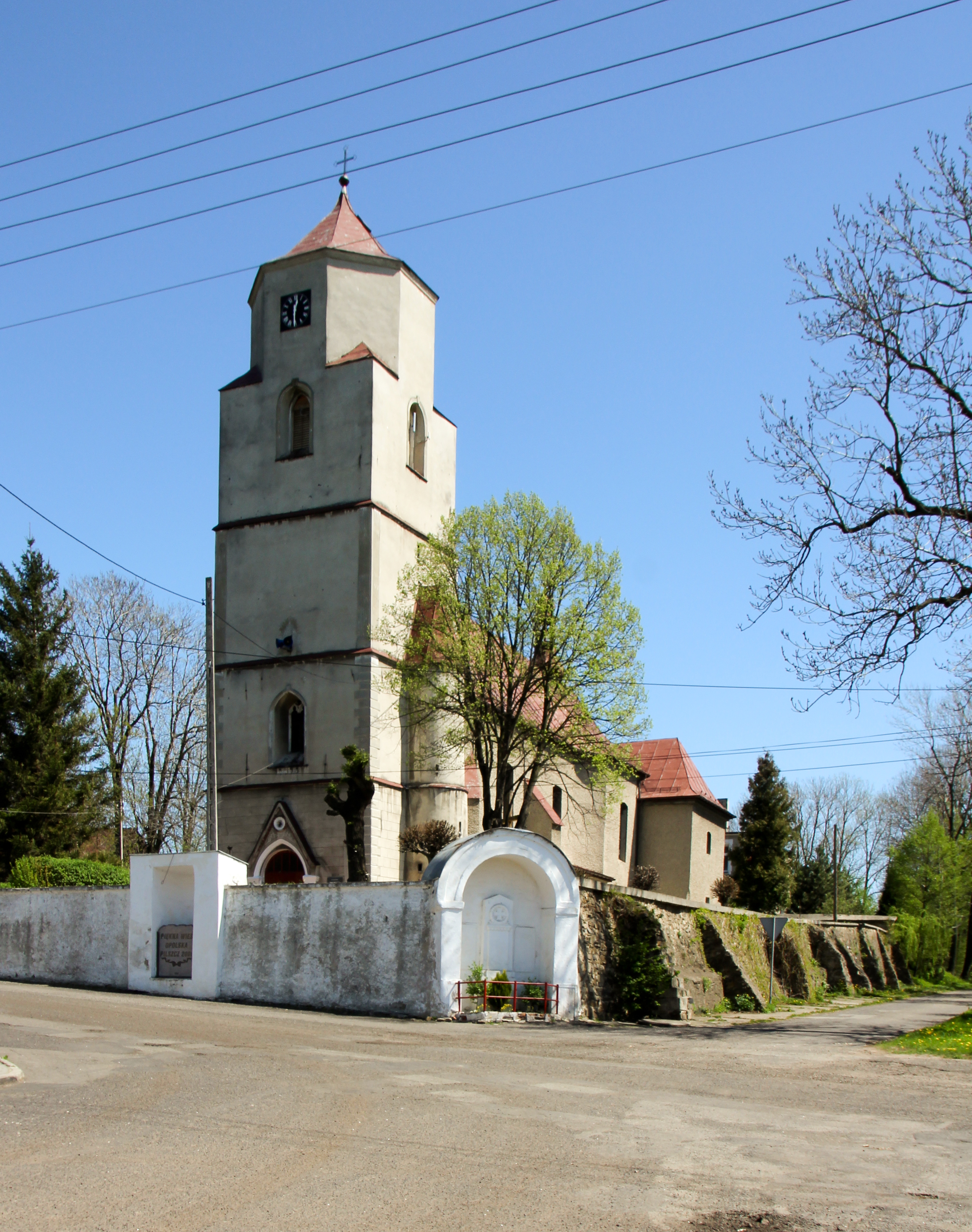 Pilszcz – kościół pątniczy parafialny pw. Wniebowzięcia NMP, z 1593 r. - XVI wieku, 1777 r., stanowiący obecnie sanktuarium Matki Boskiej Pilszczańskiej.